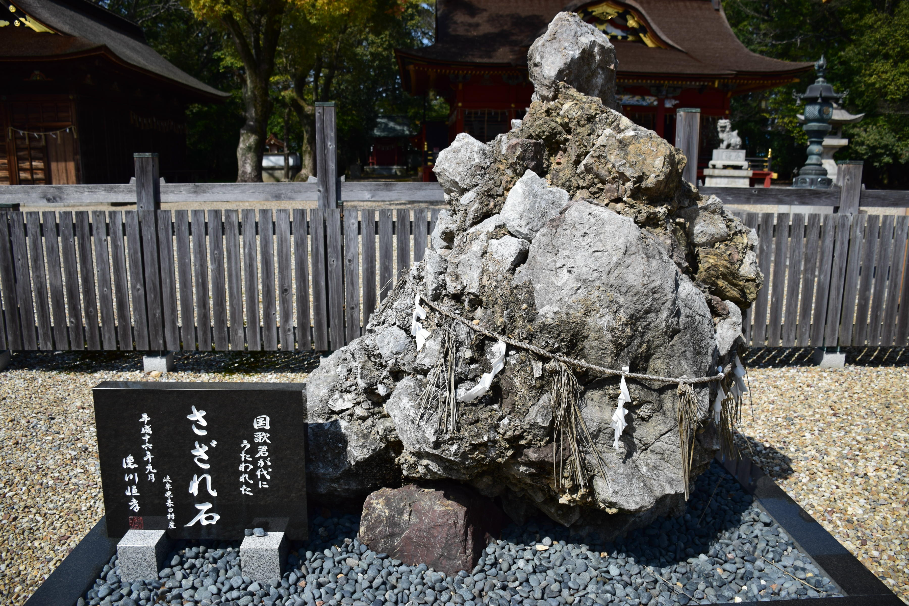 伊賀八幡宮さざれ石 Nikon D5300